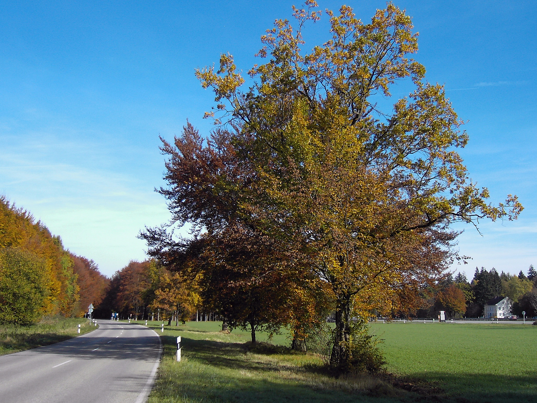 Die Grenze zum Waldgebiet des Forstenrieder Parks beim Forsthaus Oberdill (rechts), das heute als Polizeidienststelle genutzt wird. Davor die Bundesautobahn 95 (München–Garmisch-Partenkirchen), im Vordergrund die „Olympiastraße“.